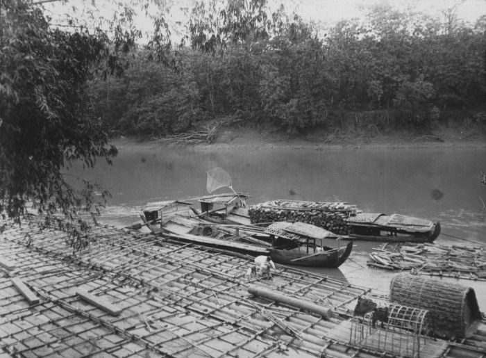 Foto. Houtvlotten en prauwen op de rivier Bengawan Solo bij Ngandong